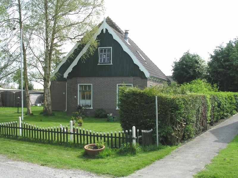 Eén van de huizen van het 'voormalige' buurtschap Twuiver. One of the houses of the 'former' hamlet of Twuiver.